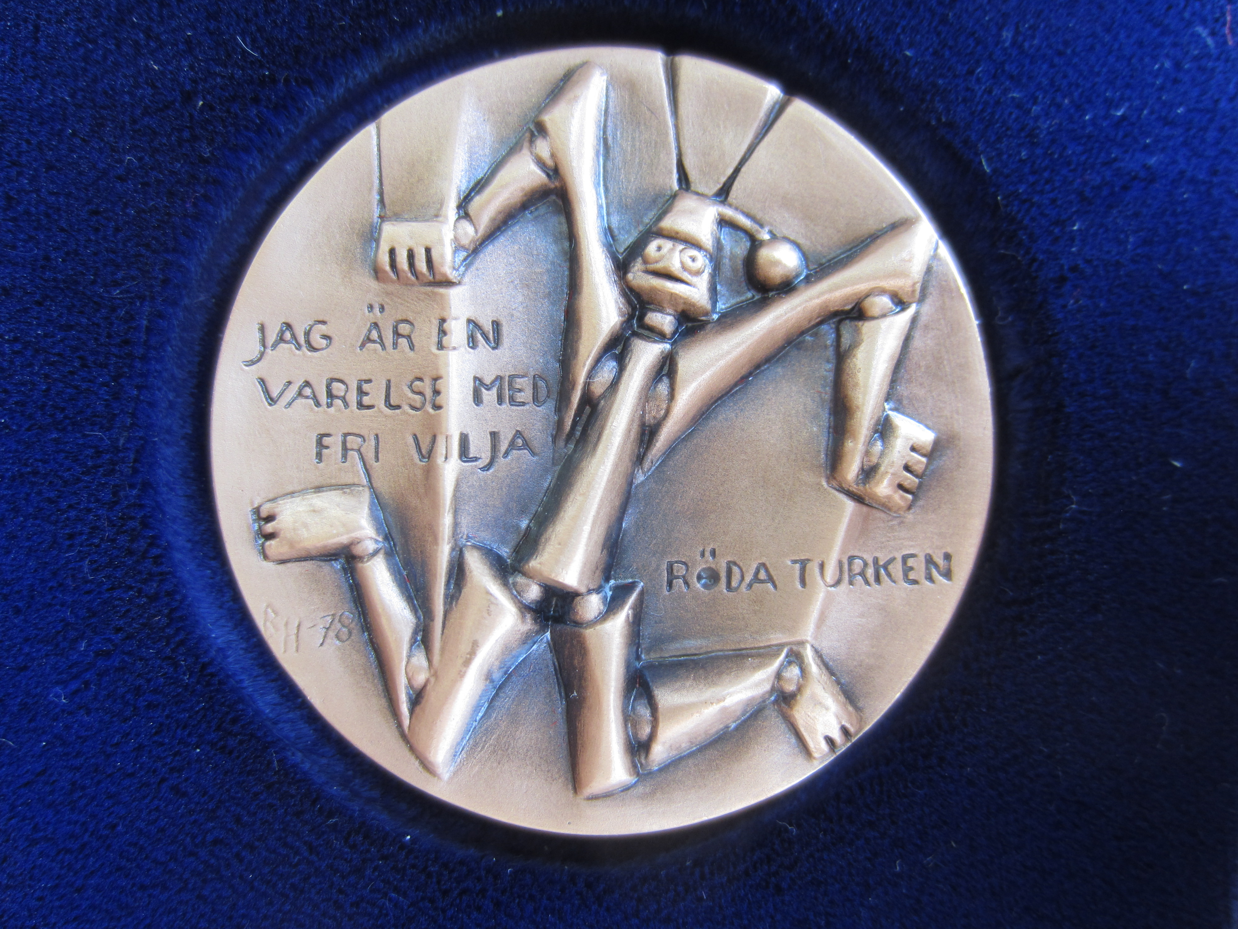 I medaljserien Stora Svenska Författare har Berndt Helleberg utformat förutom Hjalmar Söderberg även Bo Bergman, Vilhelm Ekelund, Sigfrid Siwertz och Hjalmar Bergman.